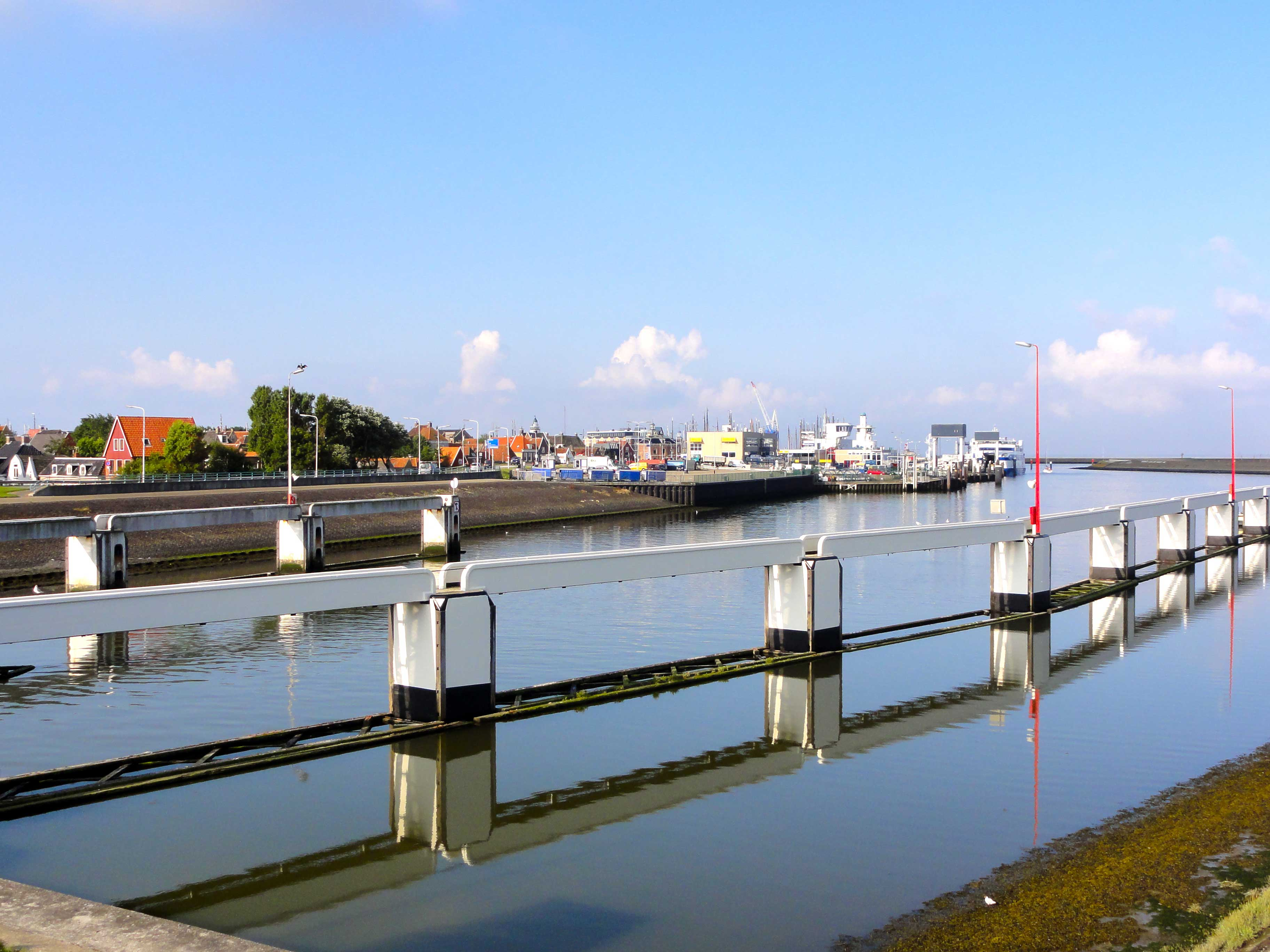 Tsjerk Hiddessluizen in Harlingen